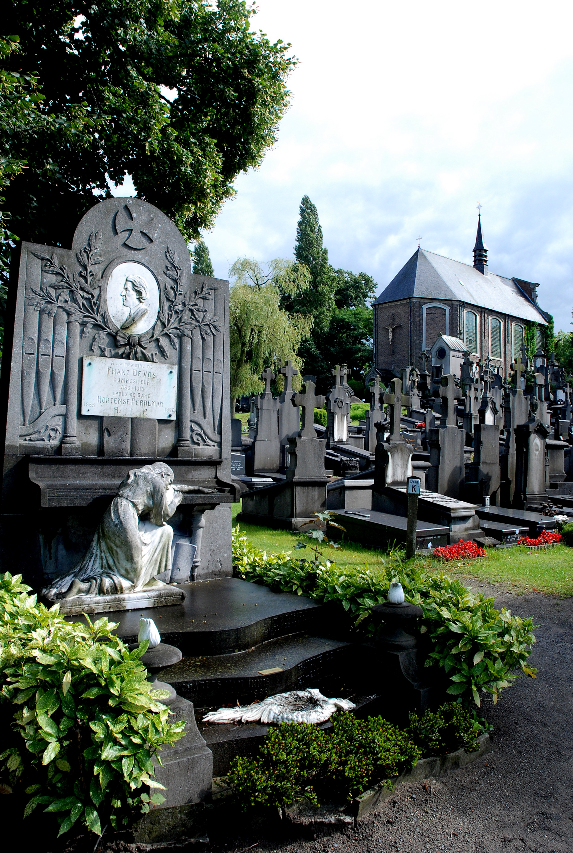 Het graf van Franz De Vos (1856-1919) op Campo Santo (Gent), Sint-Amandsberg (Gent, België)